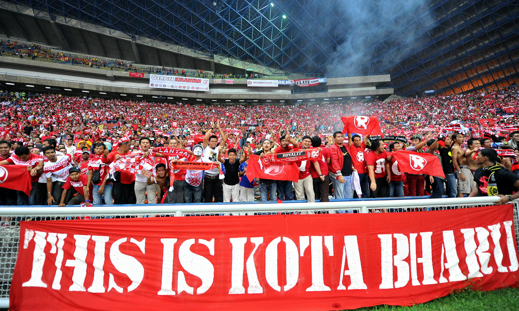 Malaysia Cup 2012 semi-finals Kelantan VS Selangor